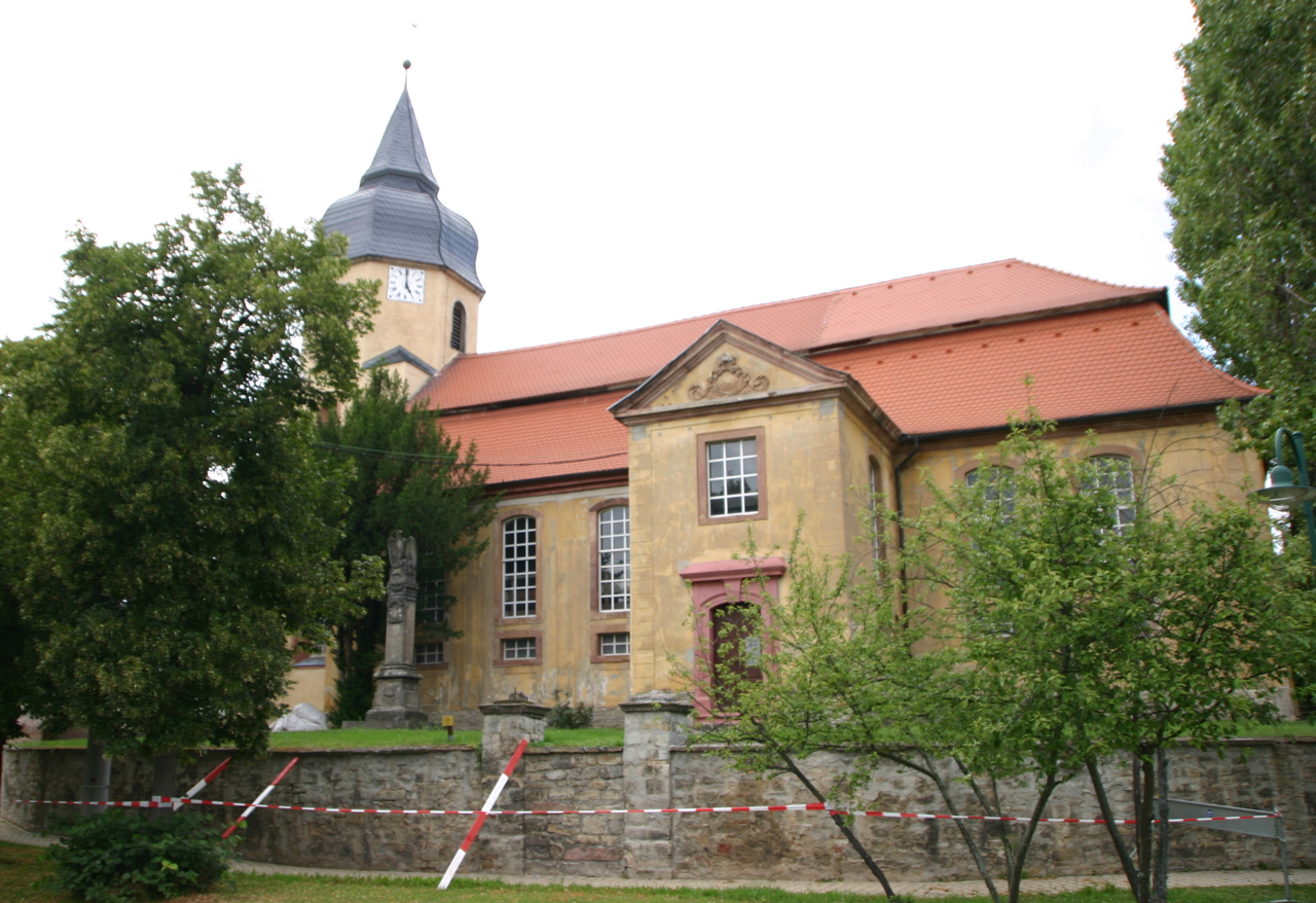 Frankleben ist ein Ortsteil von Braunsbedra[1] im Saalekreis in Sachsen-Anhalt, Deutschland.